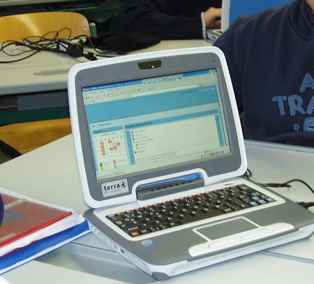 Classmate PC